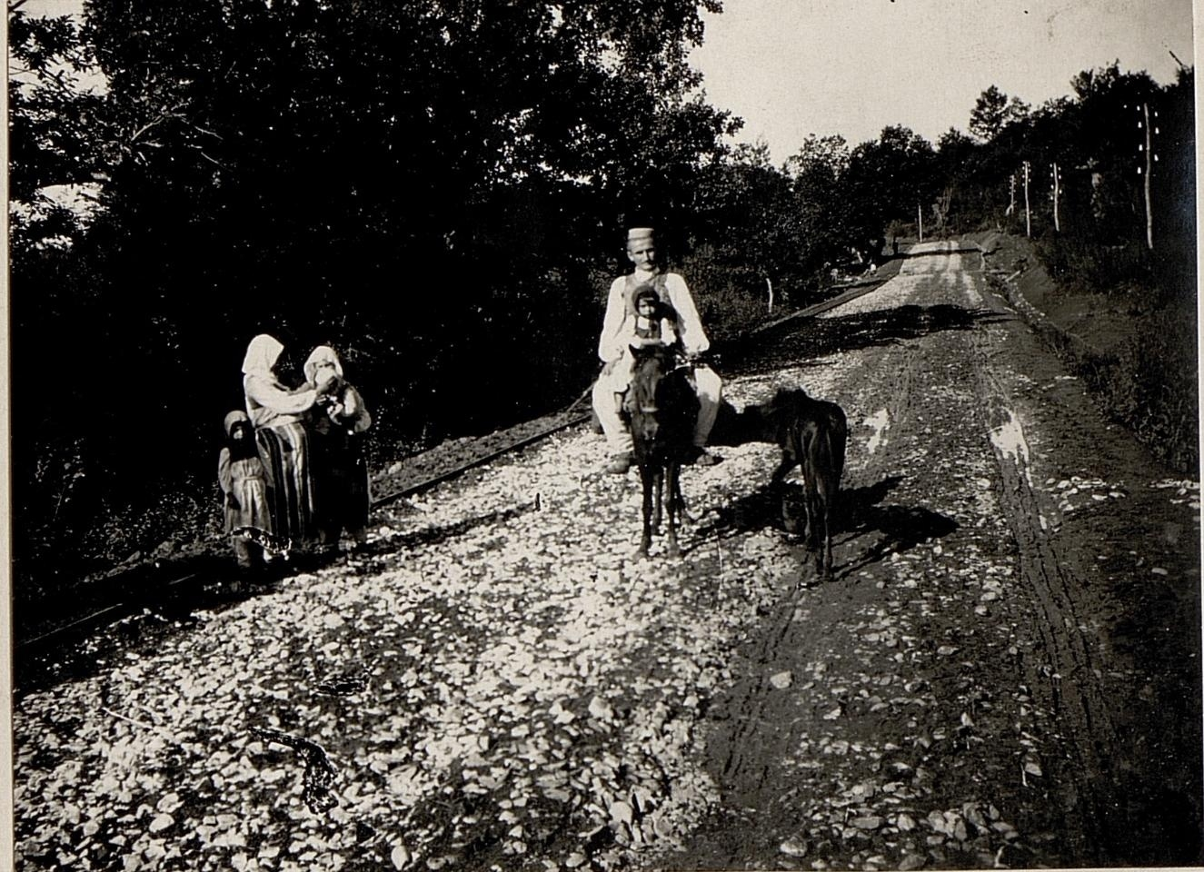 Die neue Strasse Alessio-Vorra.(bei Mamuras) Chegenfamilie auf der Reise